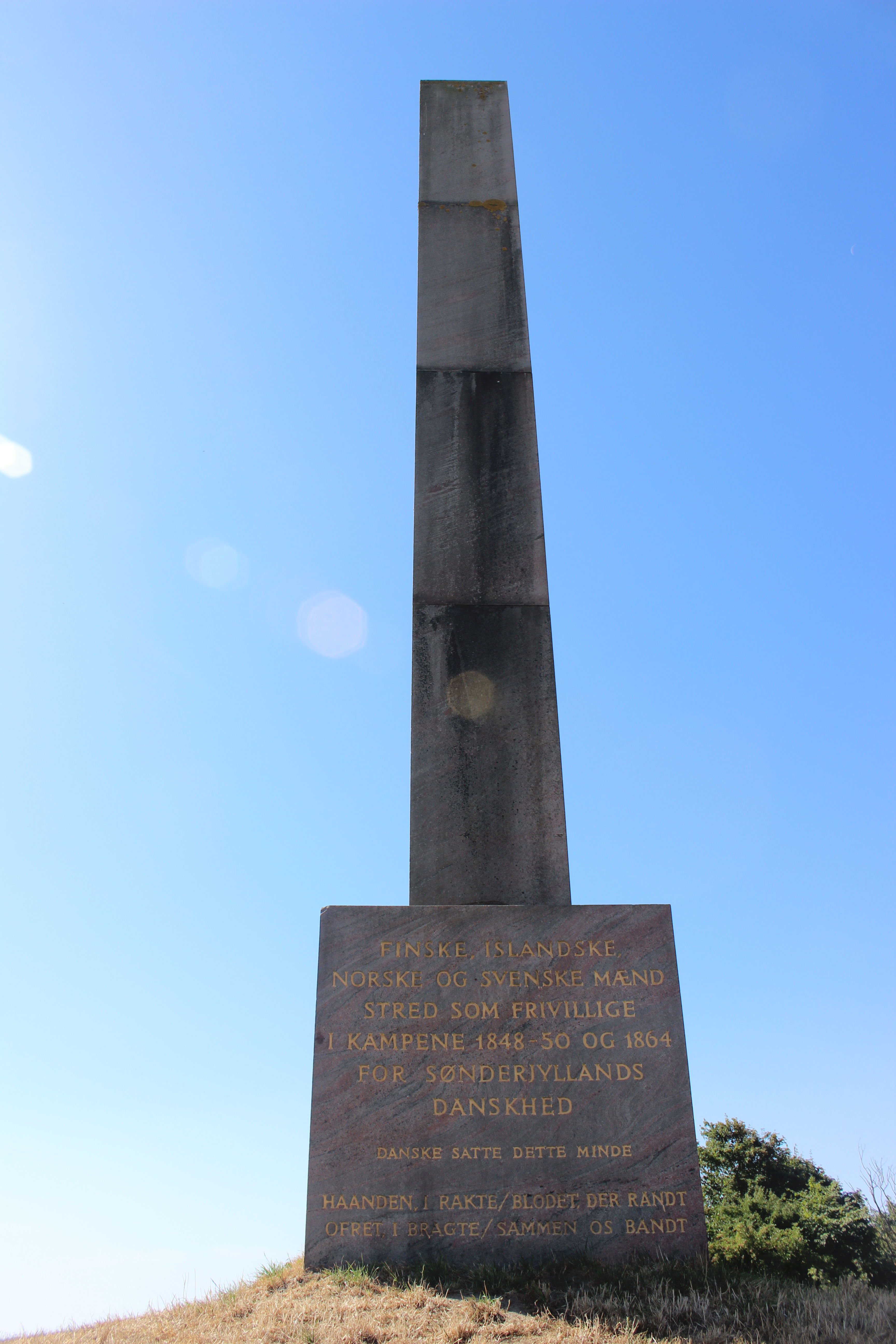 Historiecenter Dybbøl Banke, presso Sønderborg. Monumento ai soldati finlandesi, islandesi, norvegesi e svedesi.